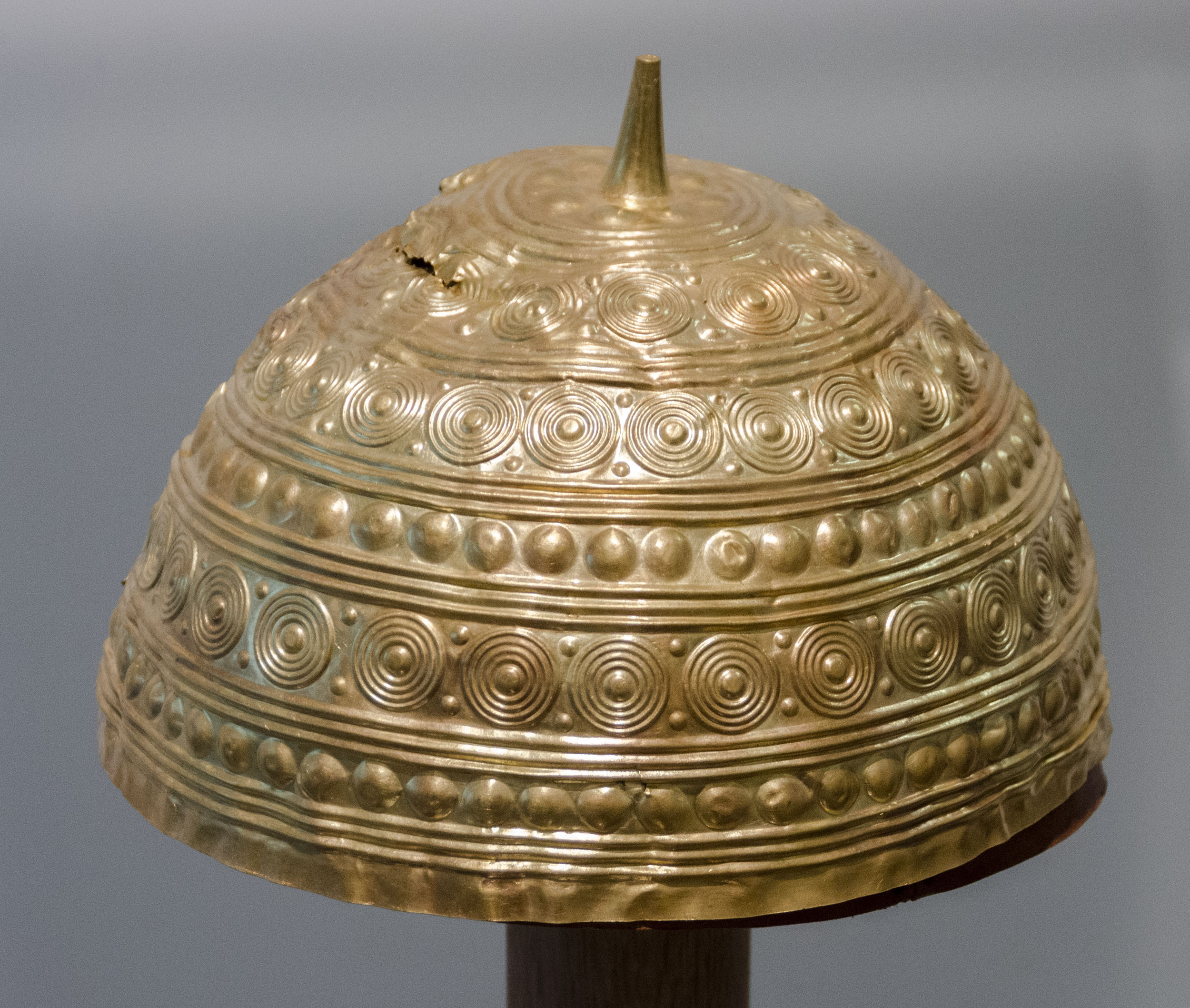 Está realizado en oro y se ha datado en el periodo de los siglos X a VI a.C. Se encontró en 1976 dentro de una vasija de barro en la parroquia de Leiro (Rianxo, A Coruña). Su peso es de 270 g y mide unos 200 mm de diámetro.